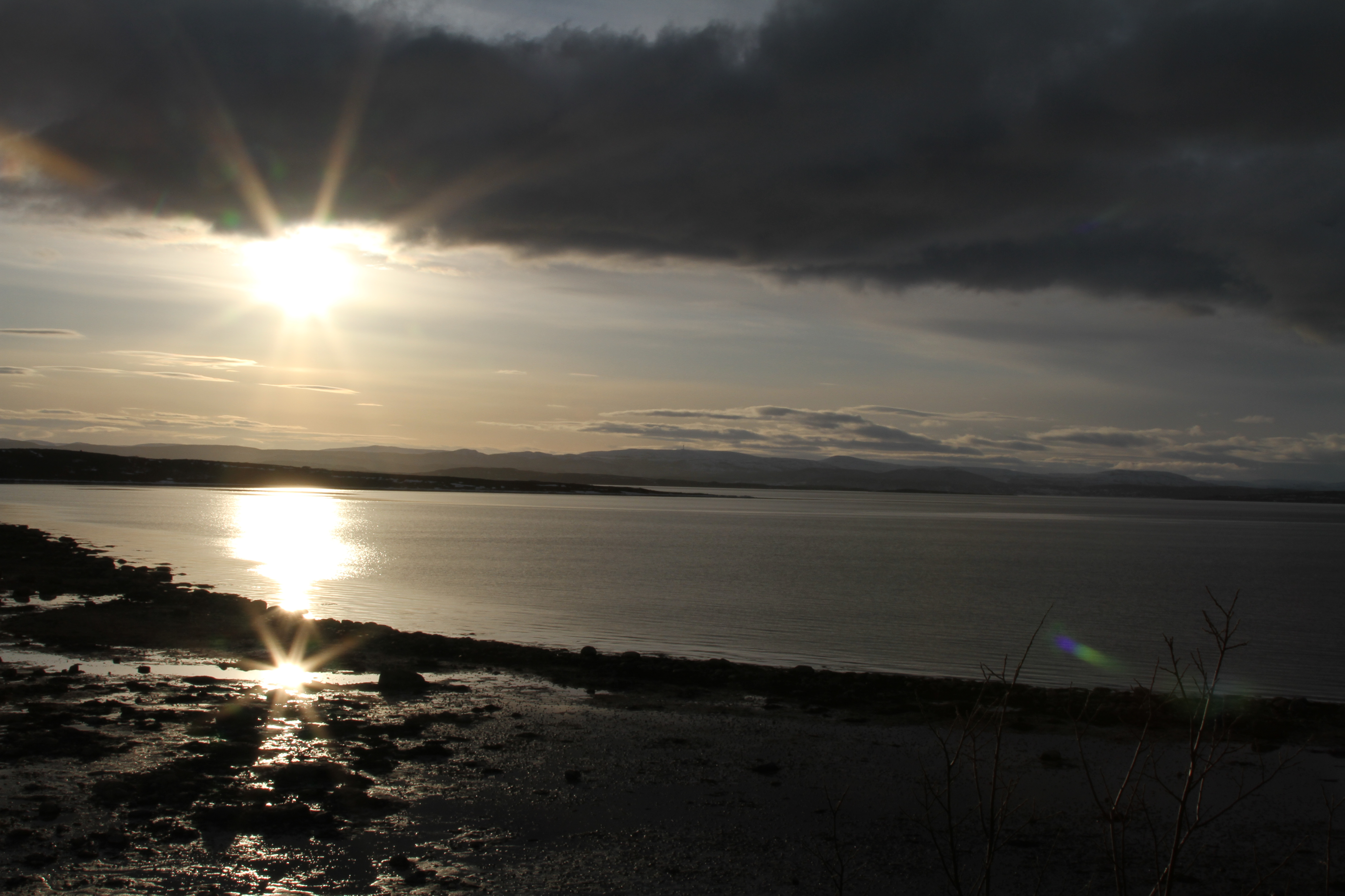 Vy från östra sidan av Porsangerfjorden, april 2012.